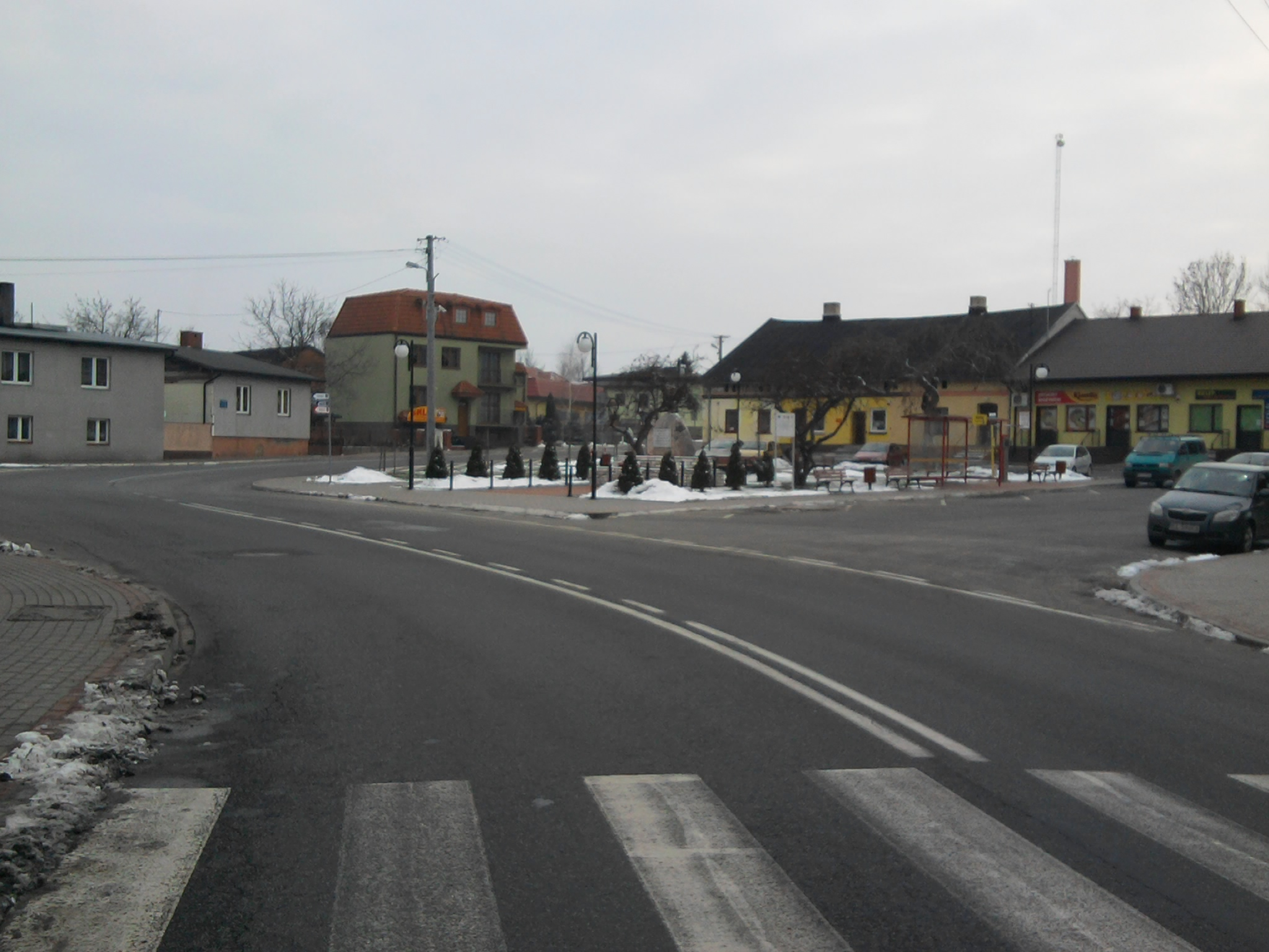 Rynek w Zadzimiu od strony Poddębic